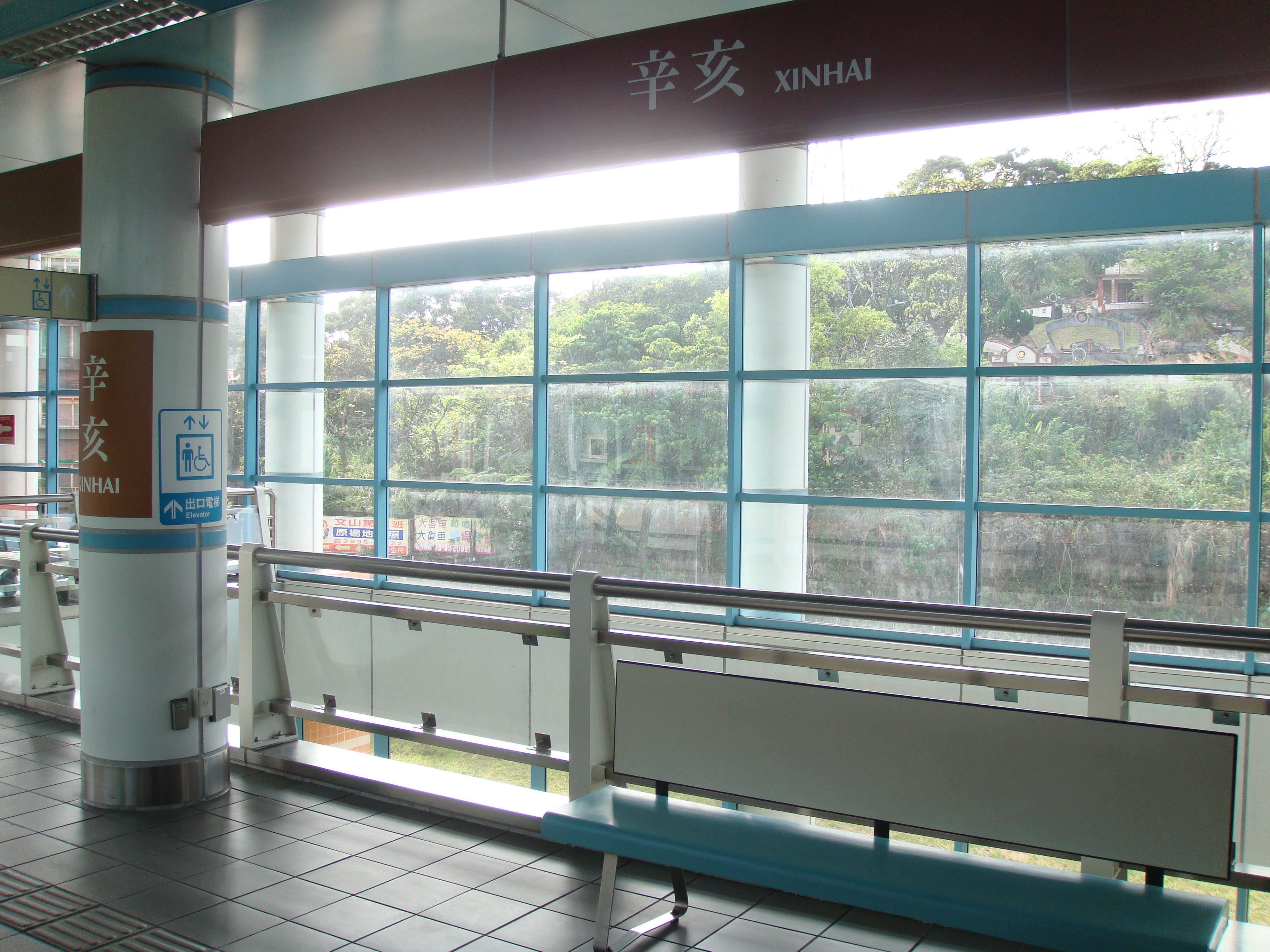 Xinhai Station, Muzha Line, Taipei Metro, Taiwan.